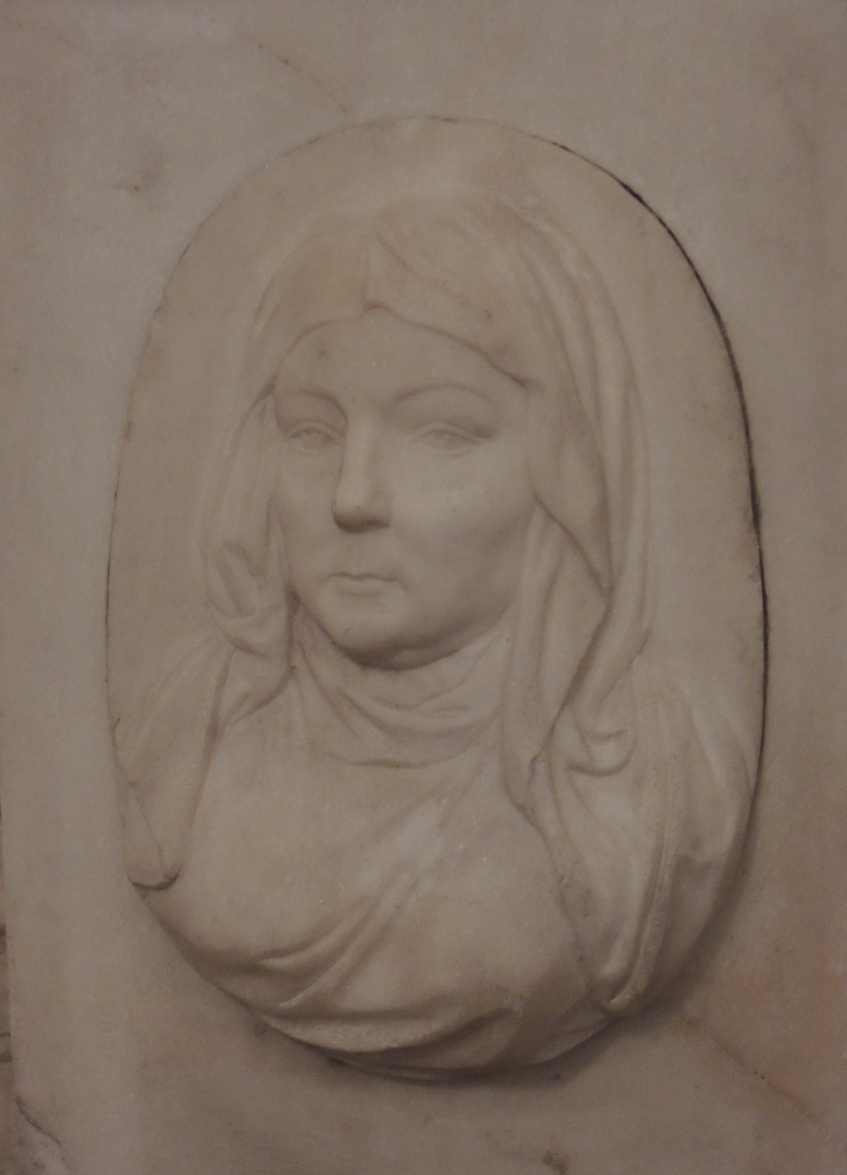 Матюшкина (рожд. Гагарина) Анна Алексеевна 17.02.1722-03.05.1804 Россия. Санкт-Петербург. Благовещенская усыпальница. Графиня, статс-дама. Старшая дочь князя A.M. Гагарина и баронессы Анны Петровны Шафировой. С 1746 г. фрейлина великой княгини Екатерины Алексеевны. В «Записках» Екатерина II отзывается о княжне Гагариной как о наиболее преданной из всех приставленных к ней императрицей придворных дам. В 1754 г. при помощи Елизаветы Петровны вышла замуж за Дмитрия Михайловича Матюшкина (1725-1800), возведенного в 1762 г. императором Австрии Францем I в графское достоинство. В день коронации Екатерины II (22.09.1762) пожалована в статс-дамы. Павел I в память службы ее при дворе его отца возвел ее в достоинство обер-гофмейстерины, а затем пожаловал в кавалерственные дамы ордена Св. Екатерины 1-го класса. Сын Матюшкиной - граф Николай Дмитриевич (умер в 1775 холостым). Дочь Софья (1755-96) вышла замуж за графа Юрия Михайловича Виельгорского. Мраморный рельеф, бронза золоченая 1800-е гг. День рождения 17 февраля (по старому стилю). День памяти 3 мая (по старому стилю).